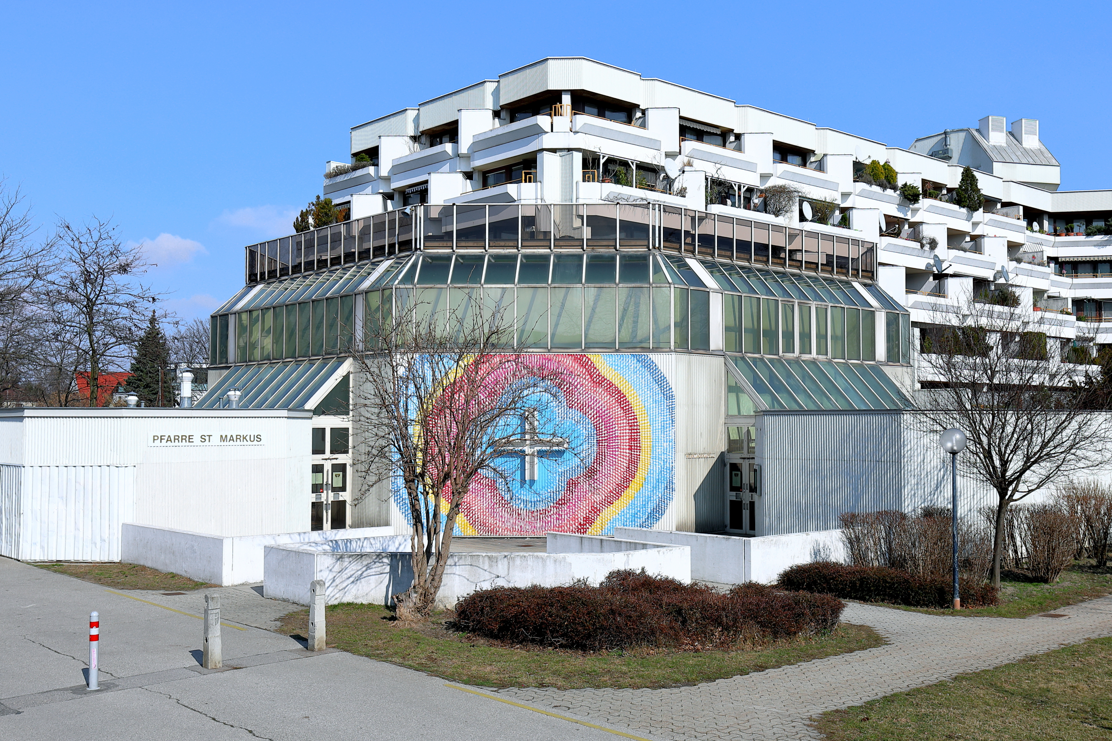 Südwestansicht der Pfarrkirche St. Markus in Großjedlersdorf, ein Bezirksteil des 21. Gemeindebezirks Floridsdorf der österreichischen Bundeshauptstadt Wien. Die Kirche wurde als Teil des Gemeindebaues „Heinz-Nittel-Hof“ errichtet und im Mai 1983 geweiht. Die Planung des Gemeindebaues mit rd. 1400 Wohneinheiten und der Kirche hatte das Architekturbüro Harry Glück & Partner inne.